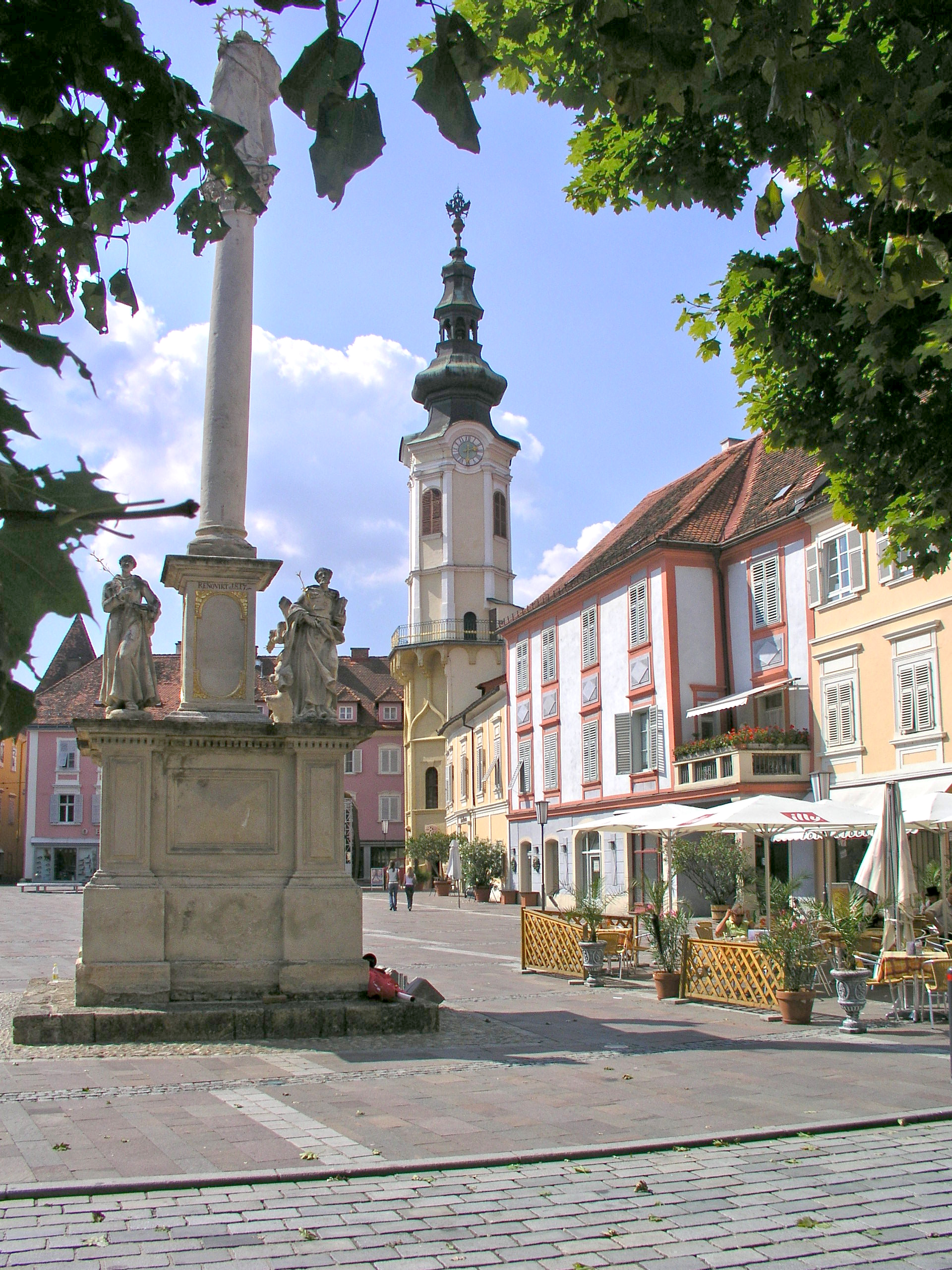 Mariensäule